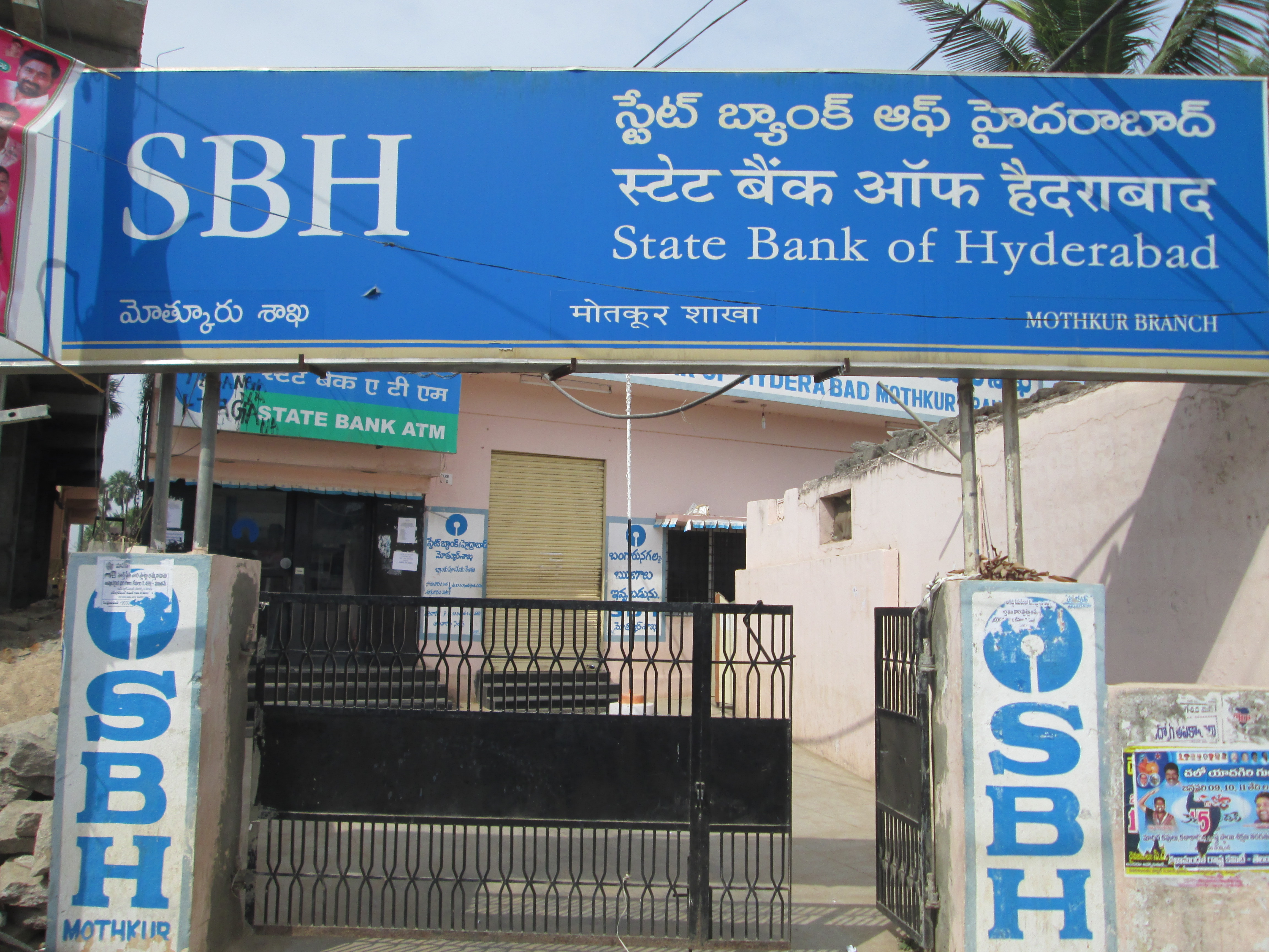 మోత్కూర్ స్టేట్ బ్యాంక్